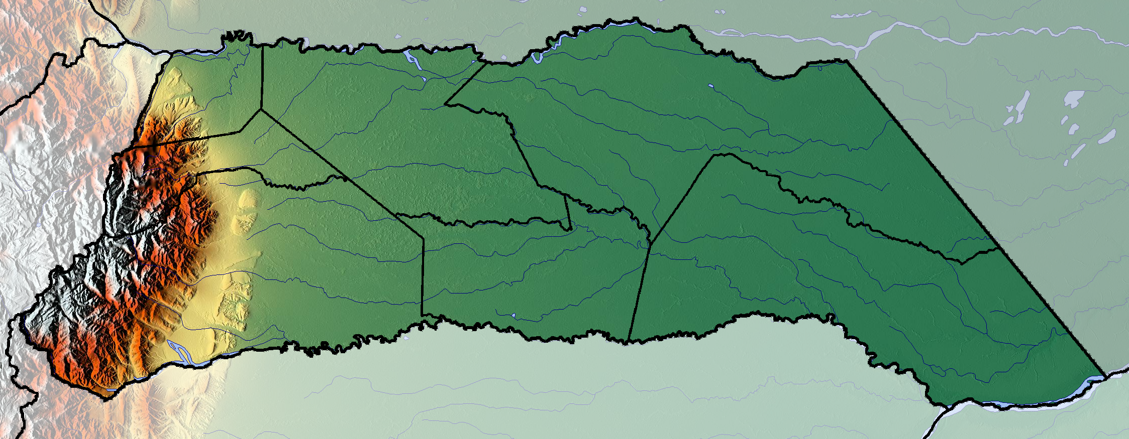 Arauca dept